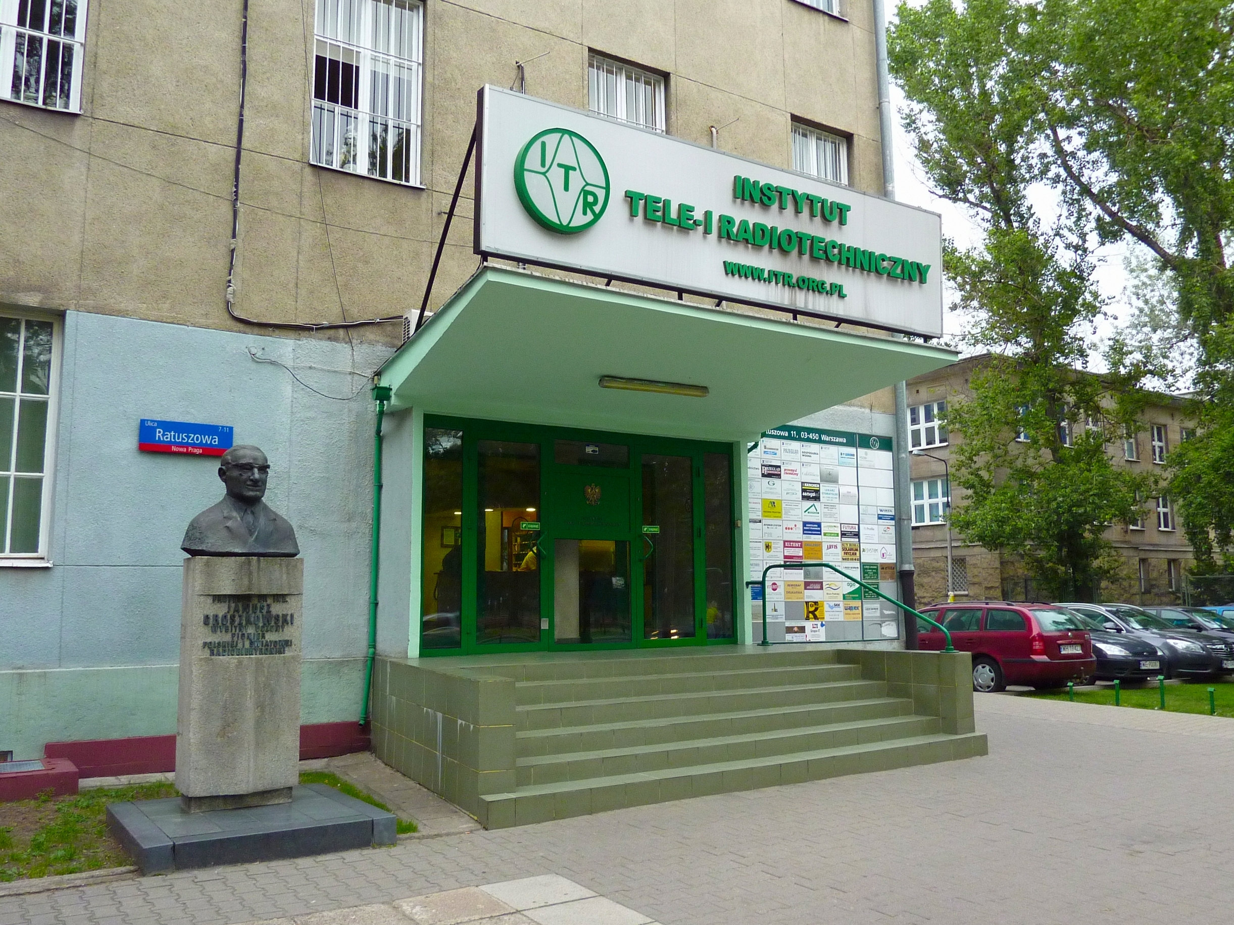 Warszawa, ul. Ratuszowa 11 – wejście do Instytutu Tele- i Radiotechnicznego. Popiersie prof. Janusza Groszkowskiego.